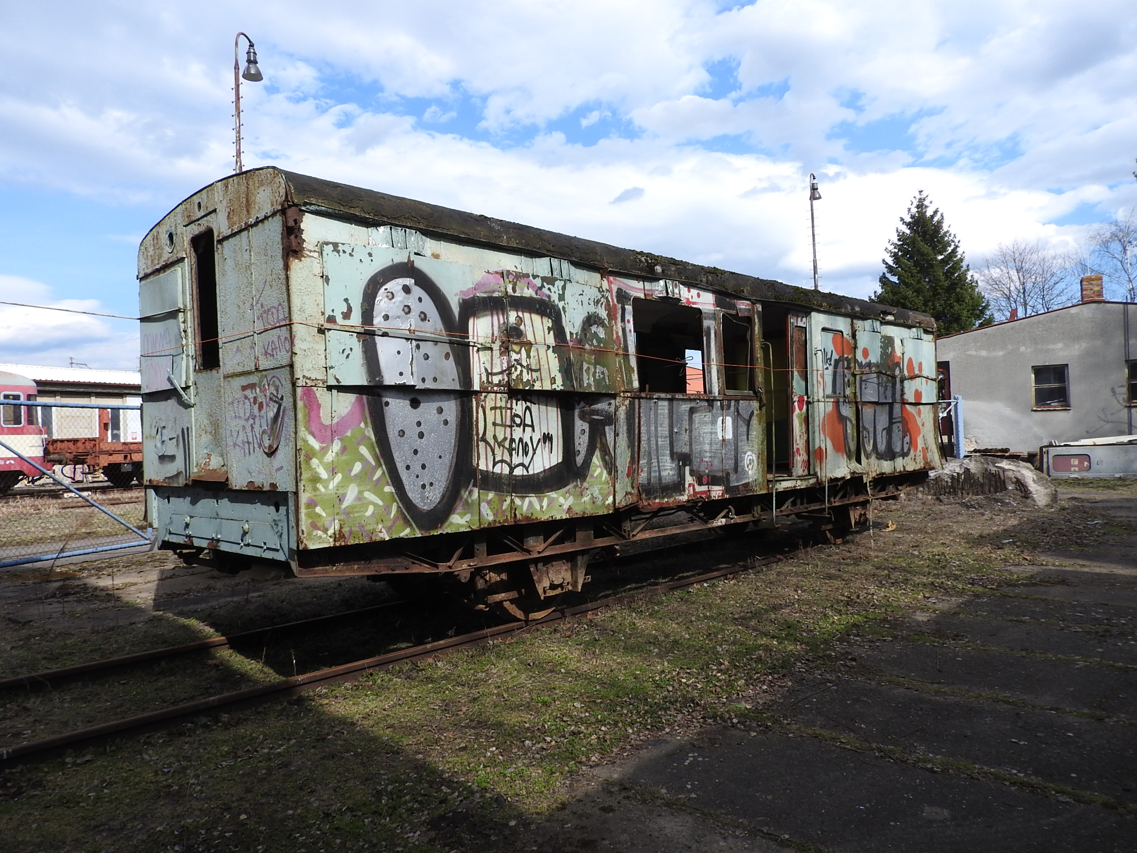 Wagenkasten und Fahrgestell des ehemaligen M 130.104 nach seiner Bergung im Depot Pardubice